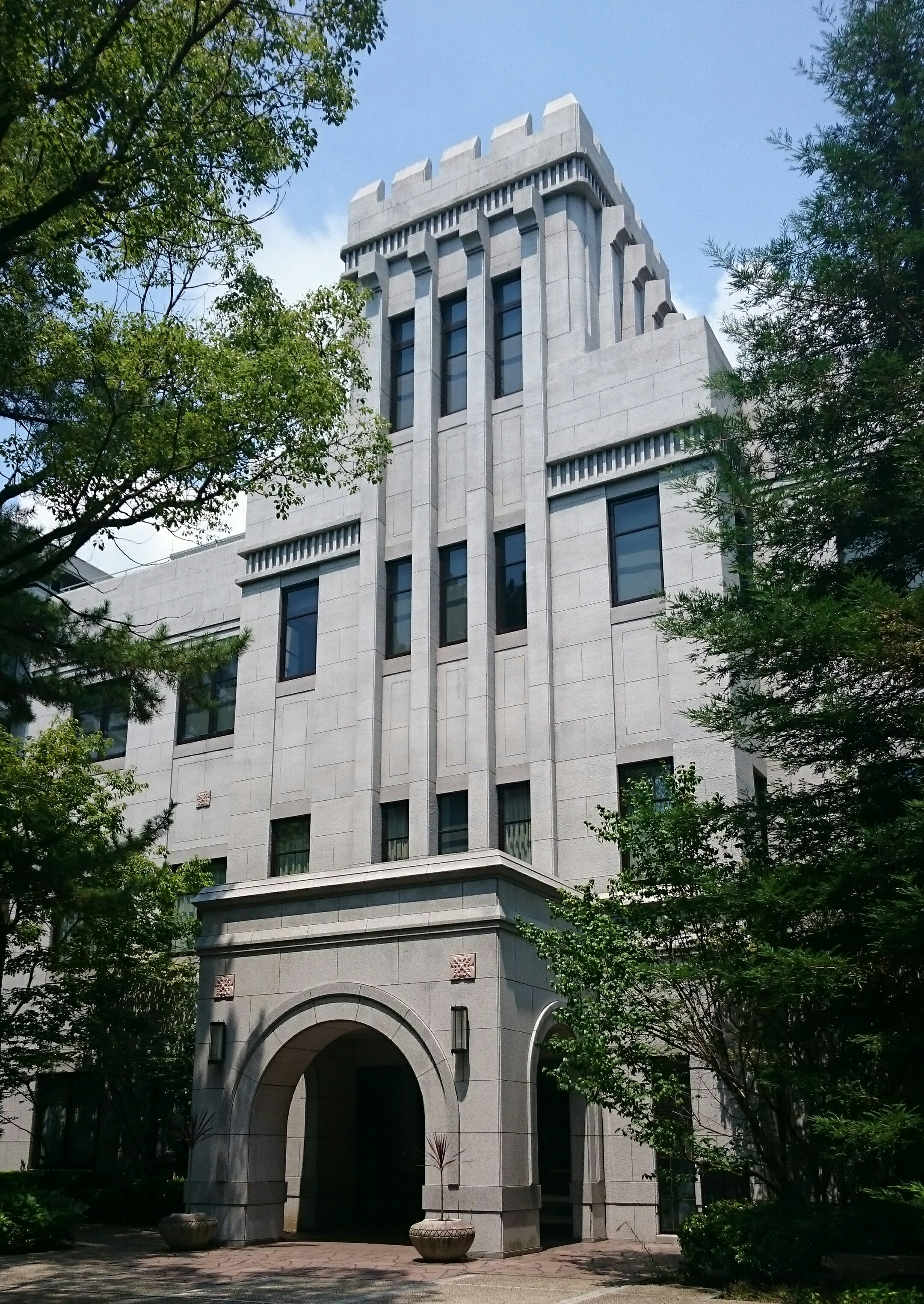 甲南大学岡本キャンパス1号館